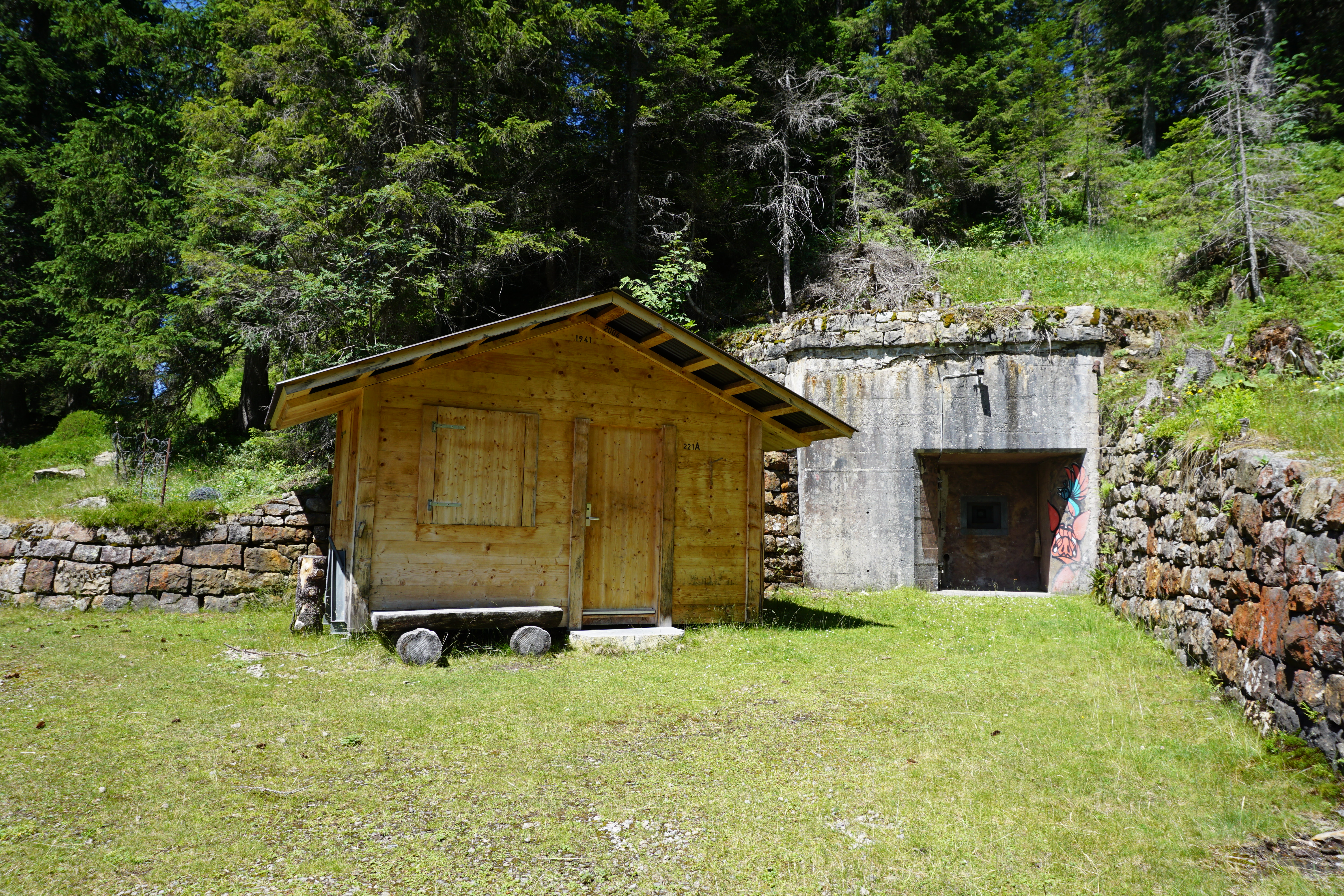 Ein Bunker am Grünenbergpass zwischen Innereriz BE und Habkern BE. Über der Schießscharte der Eingangstüre befindet sich eine Überwachungskamera: Infanteriewerk Grünenberg-Pass A 1870 und Unterkunftsbaracke B821/A221 1941